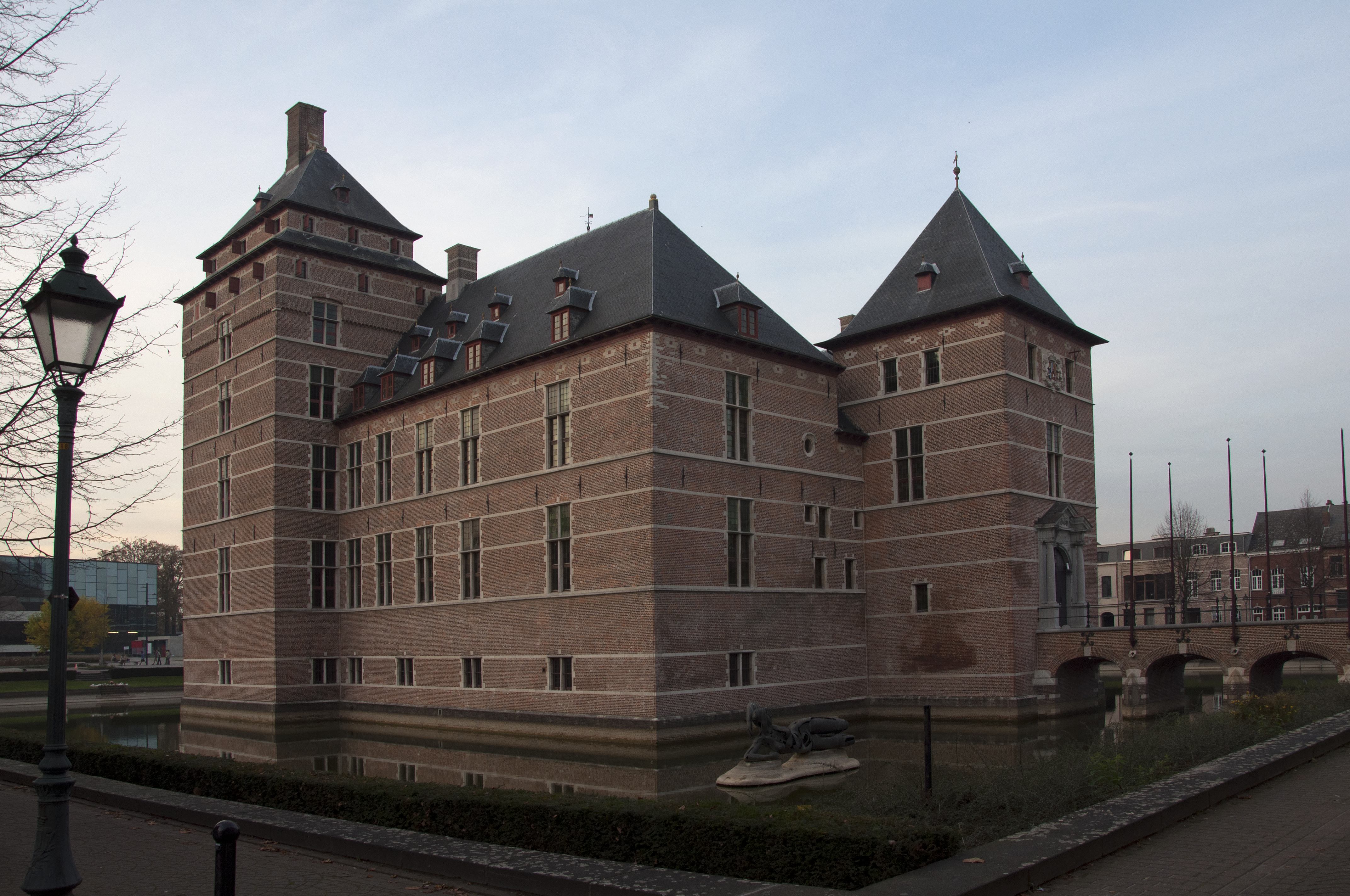 Het kasteel van de hertogen van Brabant te Turnhout, België